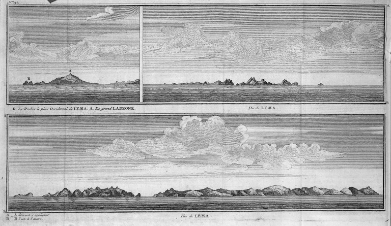 [Illustrations de Voyage autour du monde] Auteur : George Anson Éditeur : Henri-Albert Gosse et Compagnie (Genève) 1750